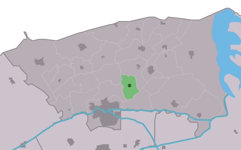 Kaartsje fan himrik fan Wetsens